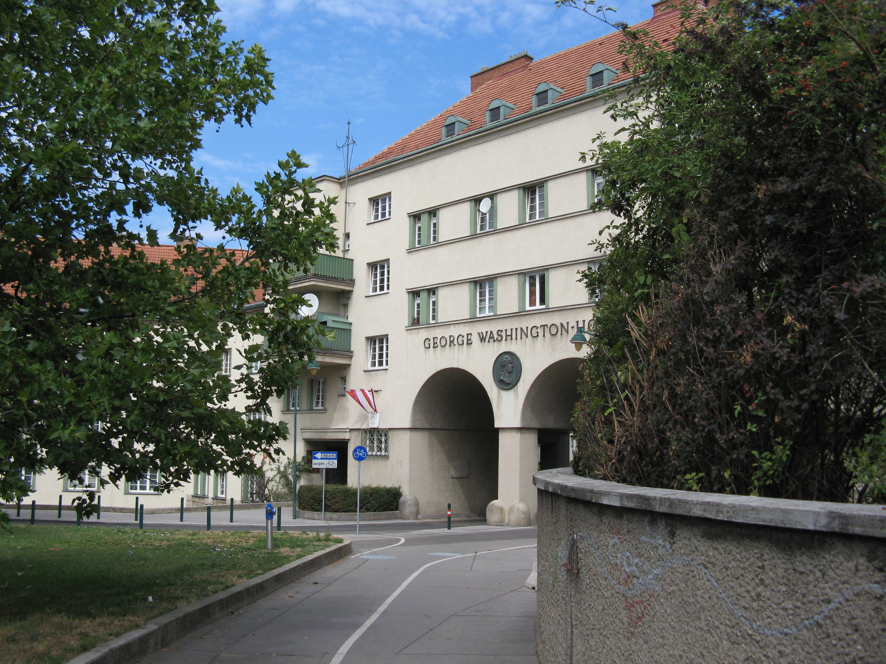 George-Washington-Hof (1927-30) von Robert Oerley und Karl Krist, Wien-Favoriten